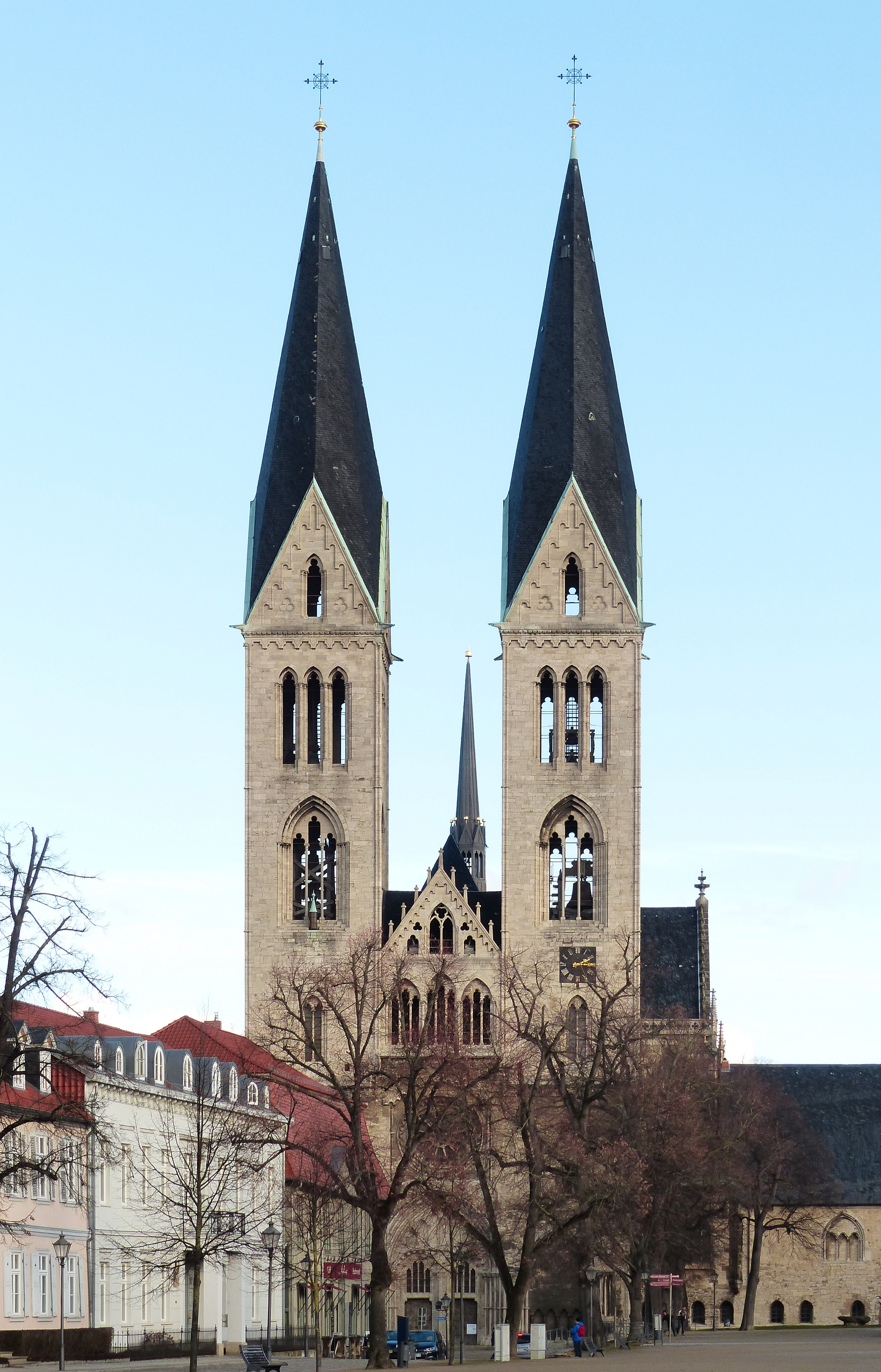 Bis zur Einweihung des gotischen Bauwerkes 1491 waren seit seinem Beginn beinahe drei Jahrhunderte vergangen. Beim Bombardement Halberstadts am 8. April 1945 durch Flugzeuge der Alliierten wurde auch der Dom schwer in Mitleidenschaft gezogen. Der Wiederaufbau vollzog sich maßgeblich während der DDR-Zeit. Sein vollständiger Name: Dom ST. Stephanus und Sixtus